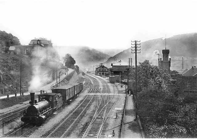 Bahnhof Lambrecht in Jahr 1900